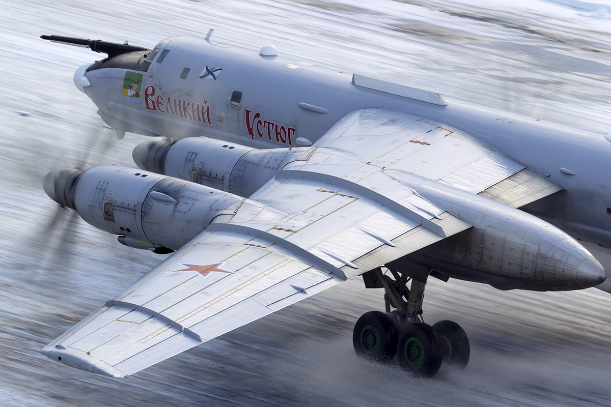 Выполнение плановых полетов на авиабазе «Кипелово»